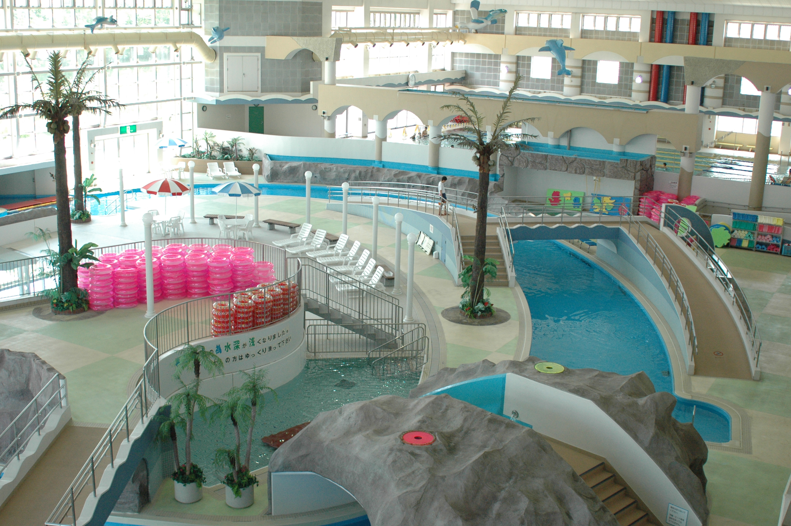 マーメイドパレスのプール